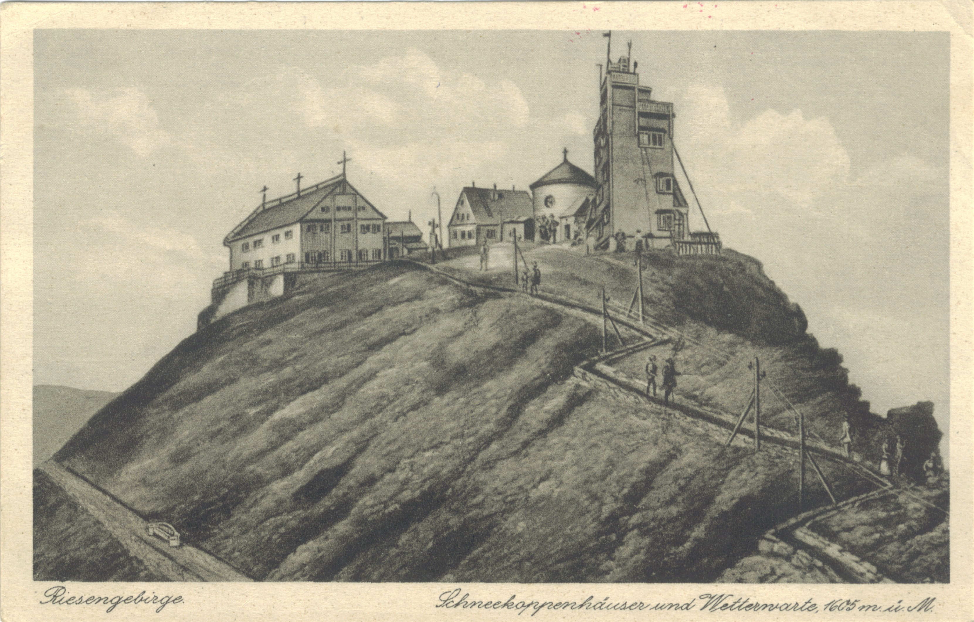 Schneekoppenhäuser und Wetterwarte um die Jahrhundertwende (1900), Kupfertiefdruck